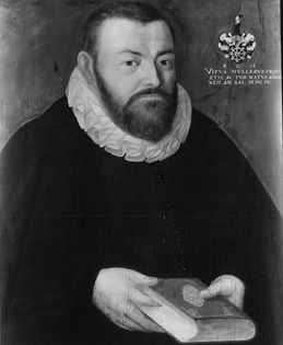 Gemälde in der Professorengalerie Tübingen